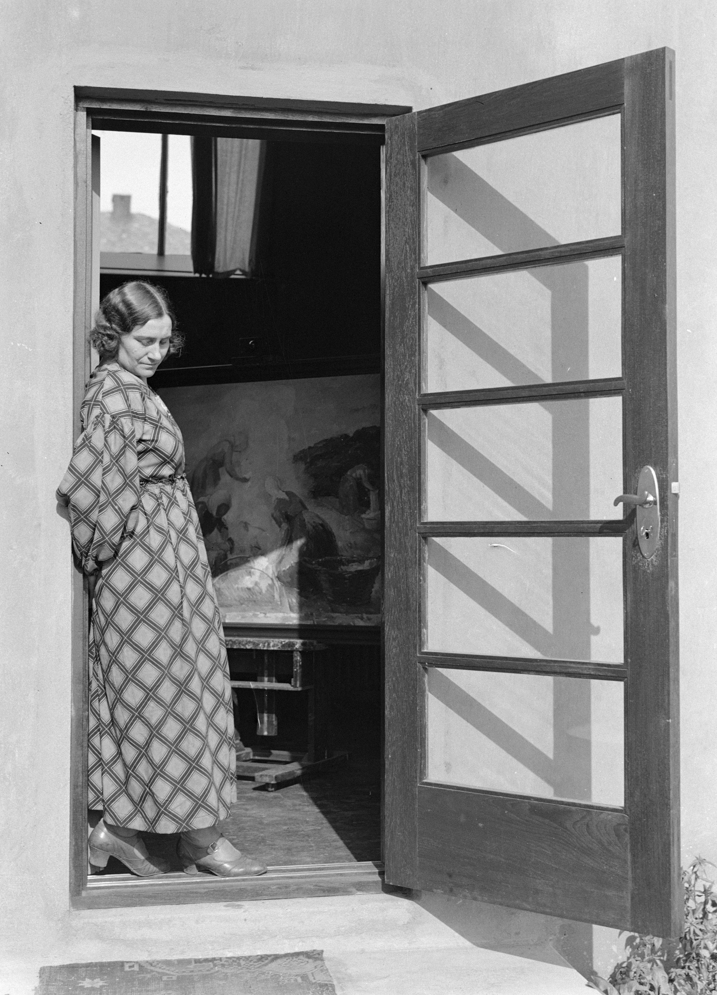 Collectie / Archief : Fotocollectie Van de Poll Reportage / Serie : IJsland Beschrijving : De schilderes Kristín Jónsdóttir leunende tegen een deurpost in haar atelier bij de geopende buitendeur Annotatie : Kristín Jónsdóttir was gehuwd met de uitgever en journalist Valtýr Stefánsson Datum : 1934 Locatie : IJsland Trefwoorden : ateliers, beeldend kunstenaars, deuren, schilders Persoonsnaam : Jónsdóttir, Kristin Fotograaf : Poll, Willem van de Auteursrechthebbende : Nationaal Archief Materiaalsoort : Glasnegatief Nummer archiefinventaris : bekijk toegang 2.24.14.02 Bestanddeelnummer : 190-0475